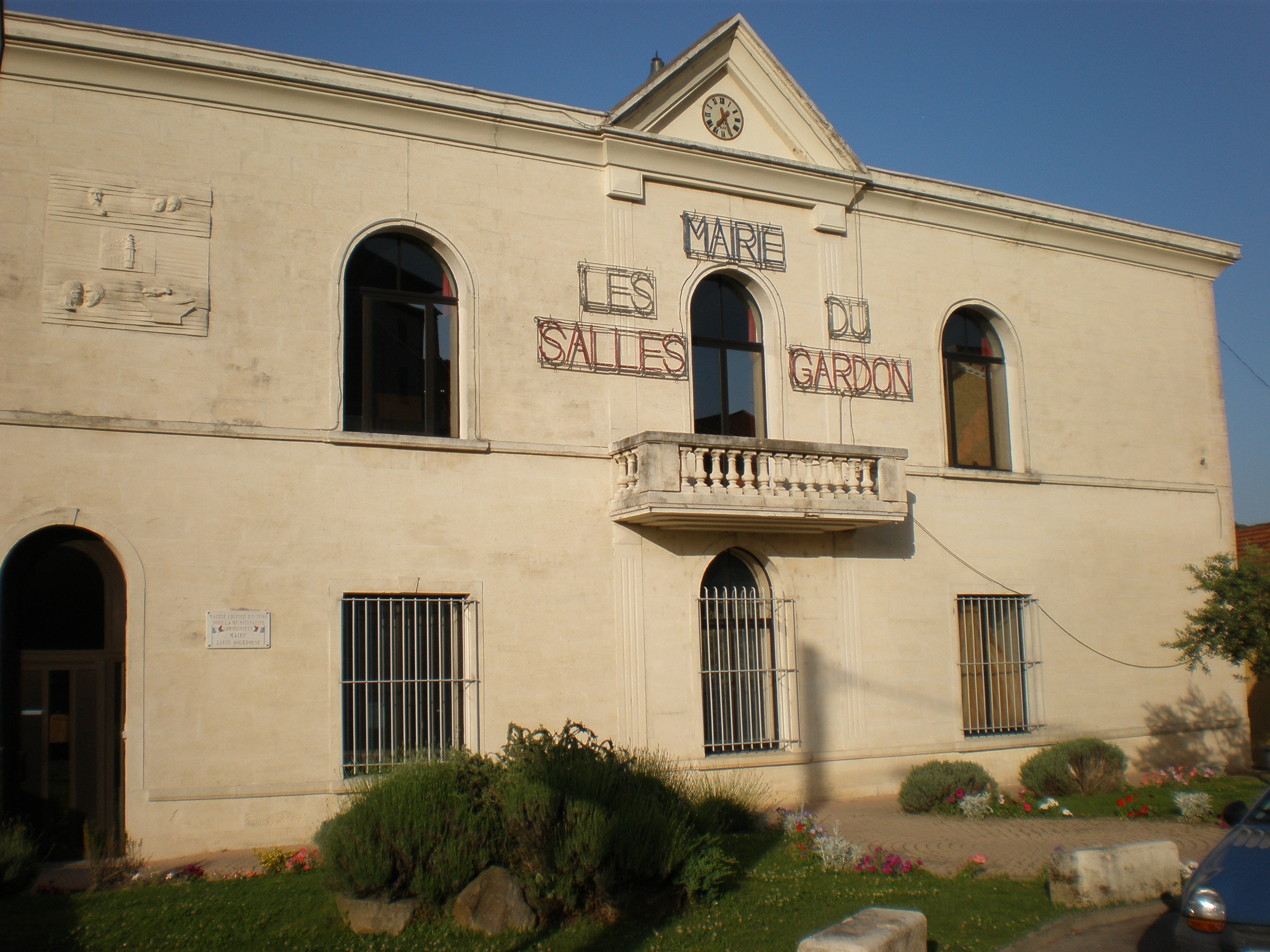 La mairie des Salles-du-Gardon (Gard)